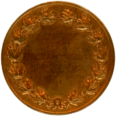 Académie Vitti - Medáille de 2 Classe - Mlle Mears - 1897